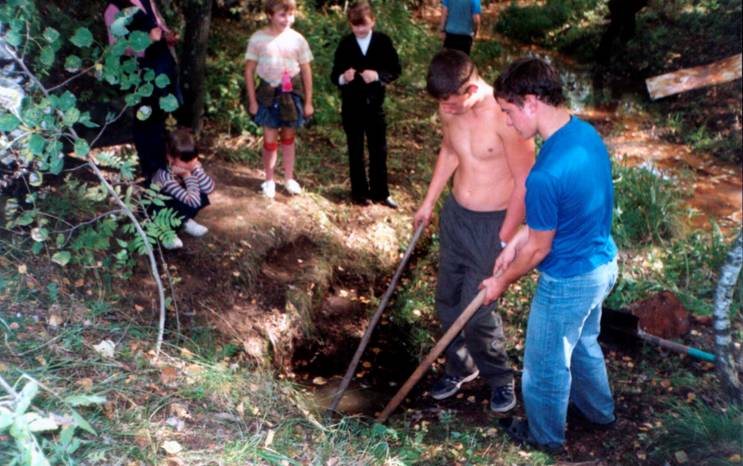 родник на реке Коровка.